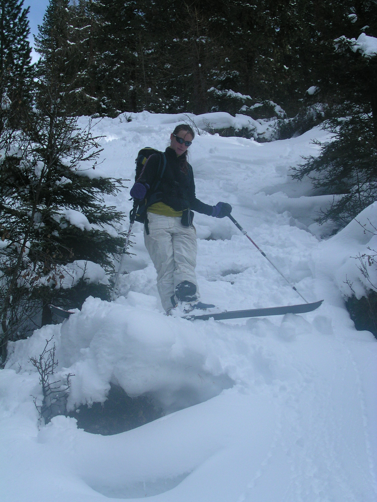 Spitzkehre abwärts